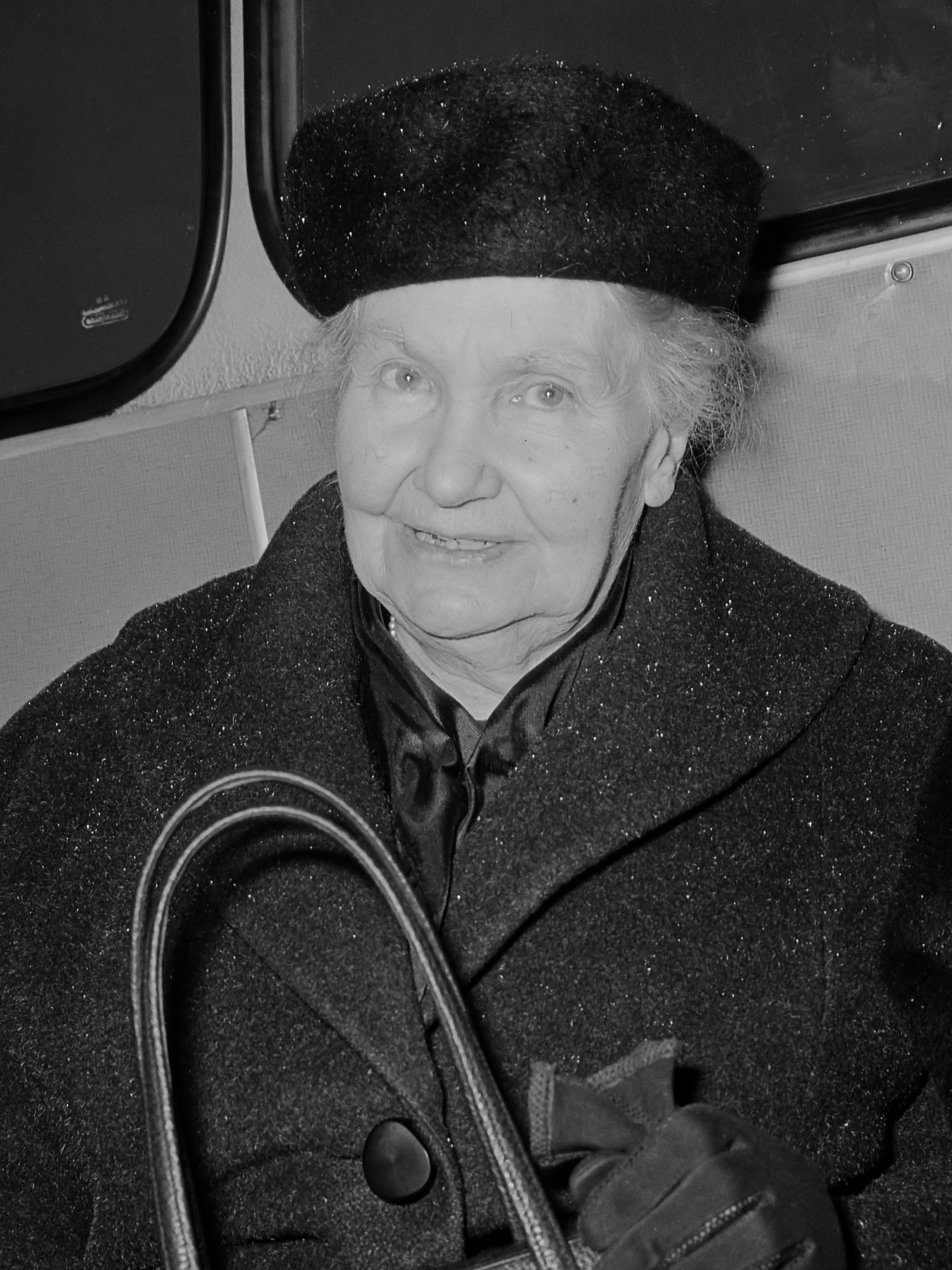 Aankomst mevrouw dr. G. Kurtz op Schiphol, ontvangt Albert Schweitzerprijs (kop) 22 januari 1965